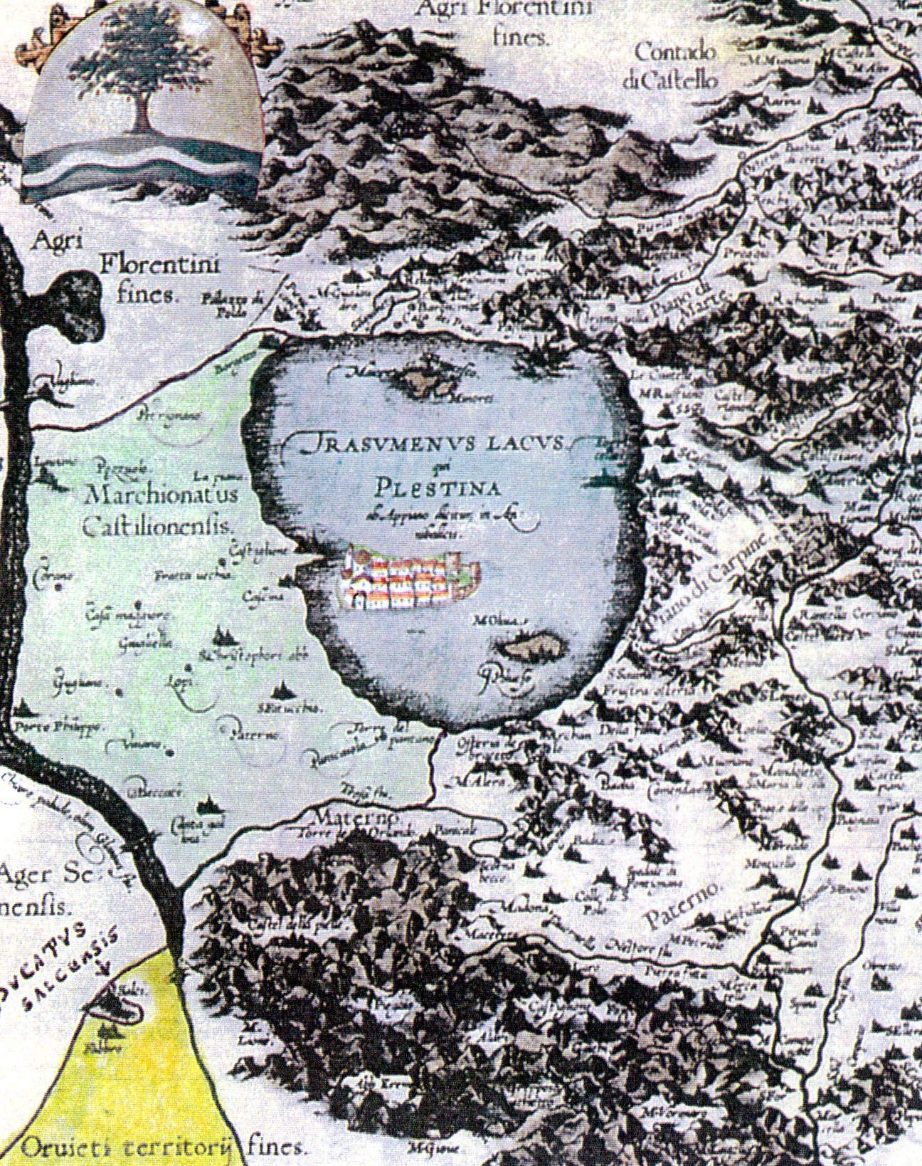 territorio del feudo pontificio di Castiglione del Lago e Trasimeno